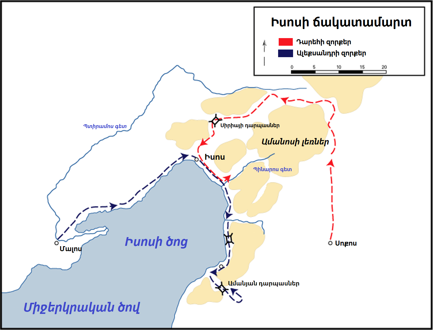 Իսոսի ճակատամարտին նախորդող զորաշարժեր